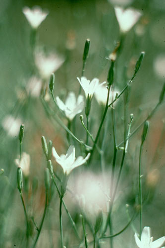 Malheur wirelettuce, Stephanomeria malheurensis.